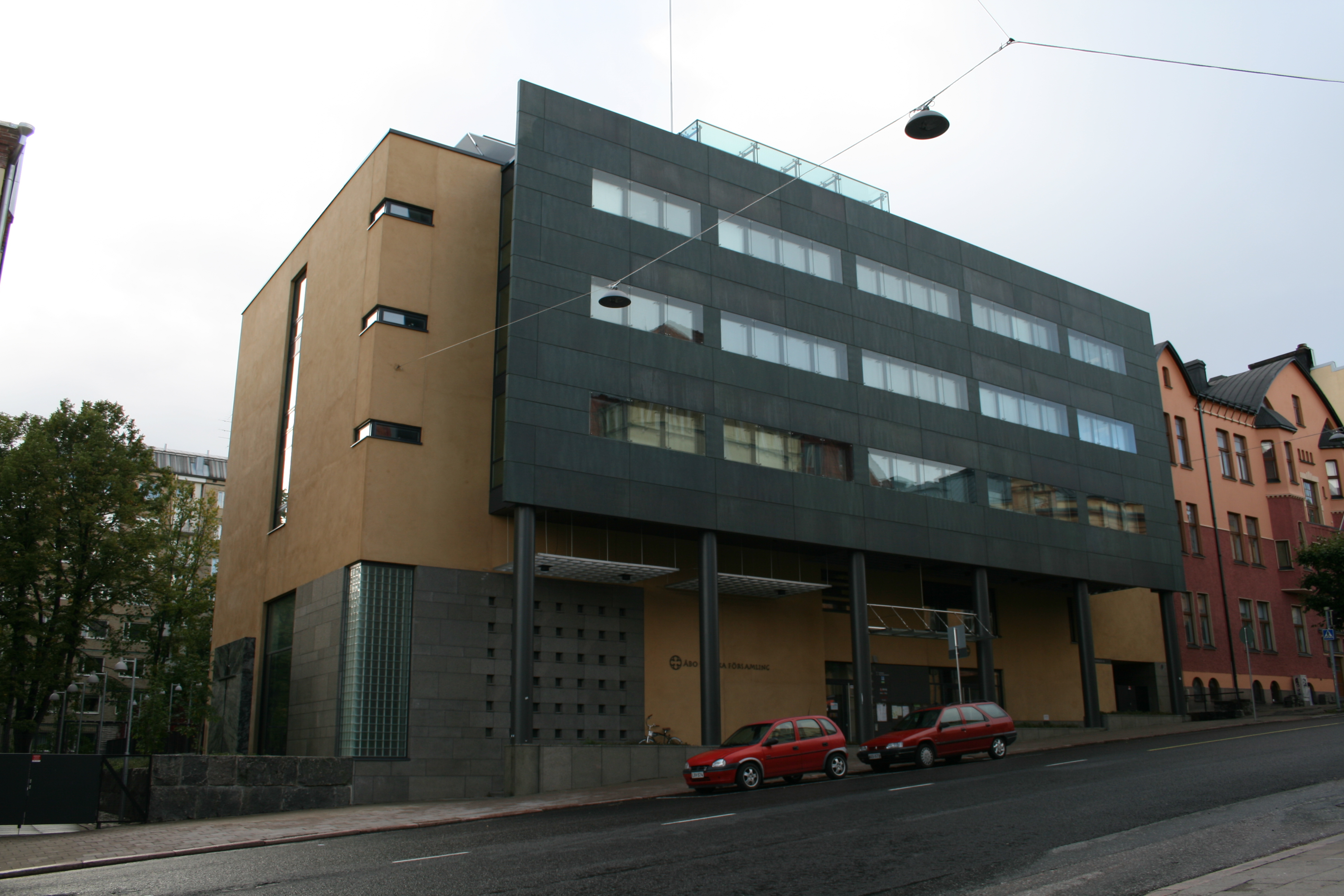 Åbo svenska församling, Turun ruotsinkielinen seurakunta. Aurakatu 18.